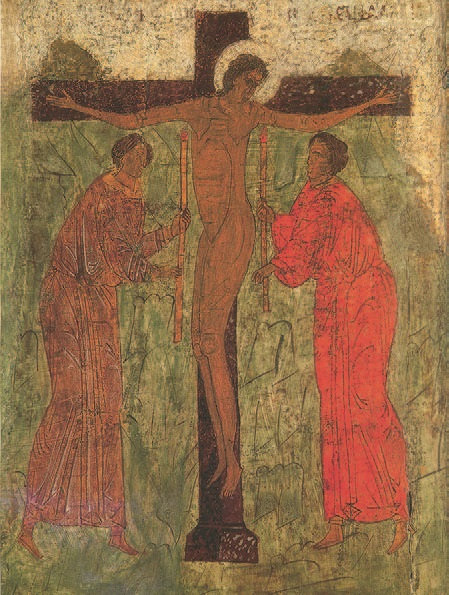 Paraskeva. Pskov museum